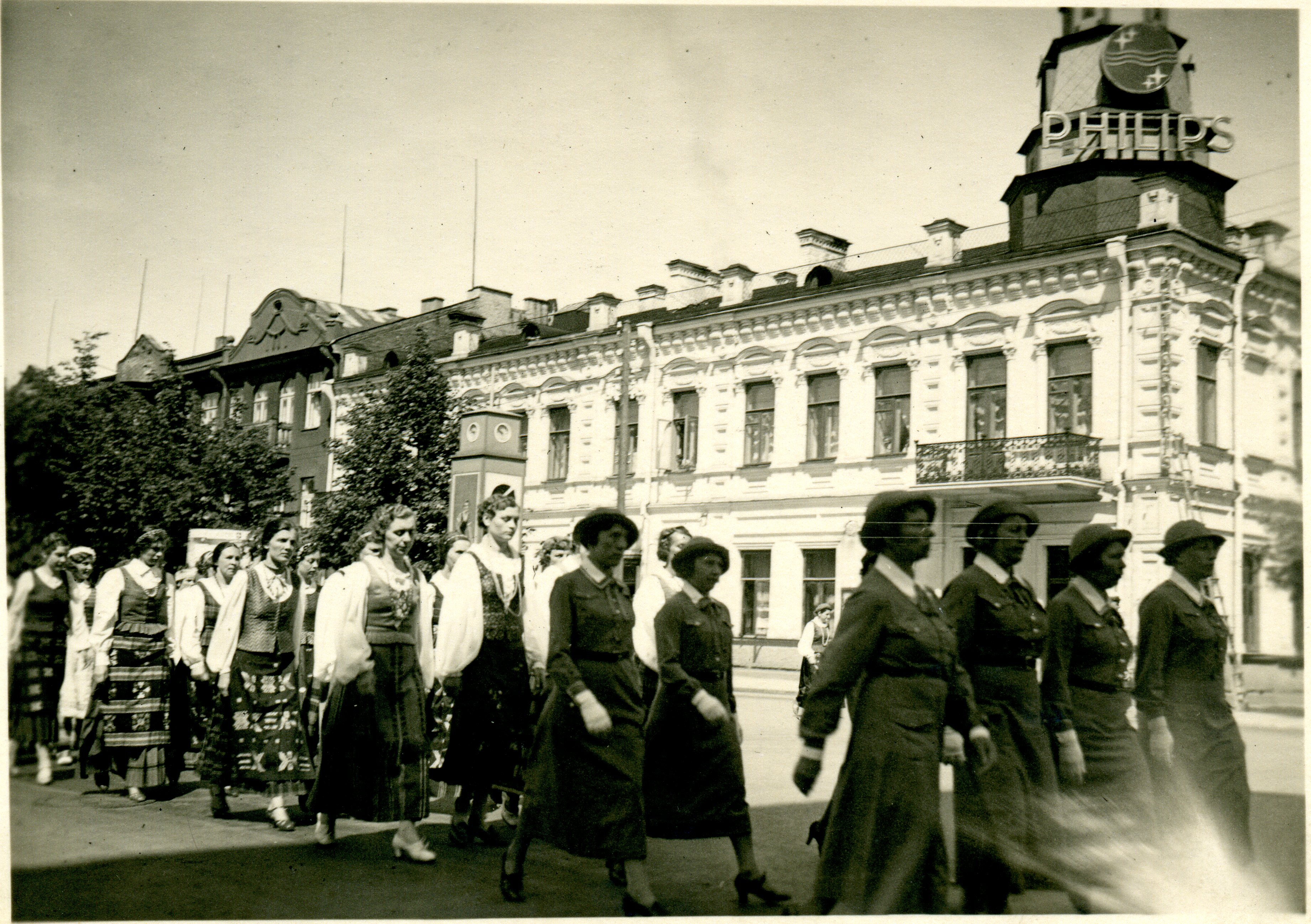 Dainų šventės, vykusios Kaune 1937 m., dalyviai žygiuoja miesto gatvėmis.